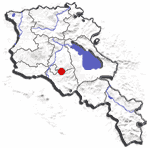 Mapa de localización de Garni, Armenia. Location map for Garni, Armenia